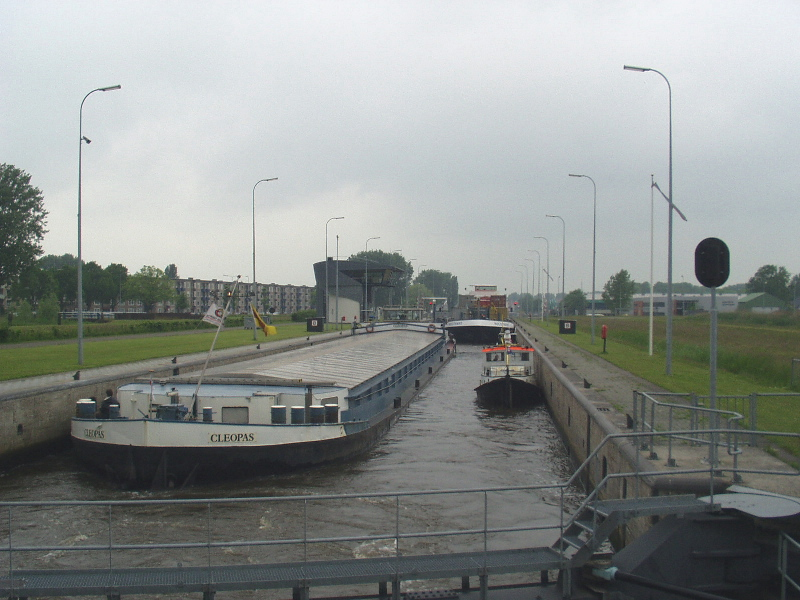 zelf gemaakt op 2/6/2005 De Cleopas is gebouwd als sleepschip Haniel No 65 Katernberg in 1921 en werd in 1951 gemotoriseerd. Lengte 80,00 m Breedte 9,48 m Diepgang 2,50 m Laadvermogen 1272 ton Motor: GM 750 pk ENI-Nummer 2314223